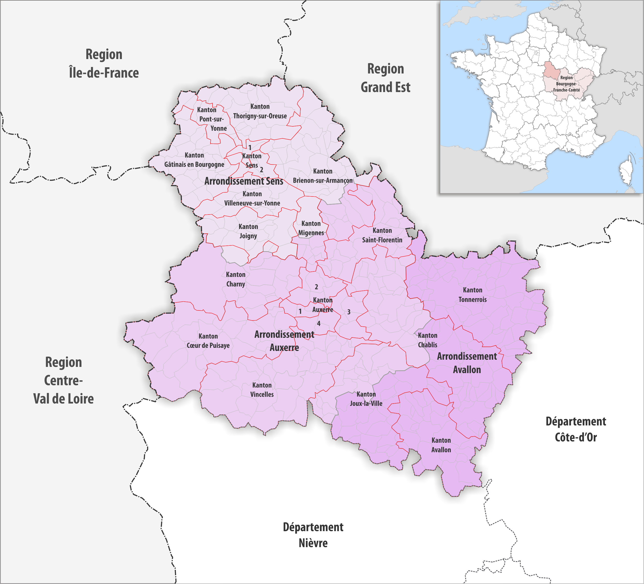 Gemeinden, Kantone und Arrondissemente im Departement Yonne